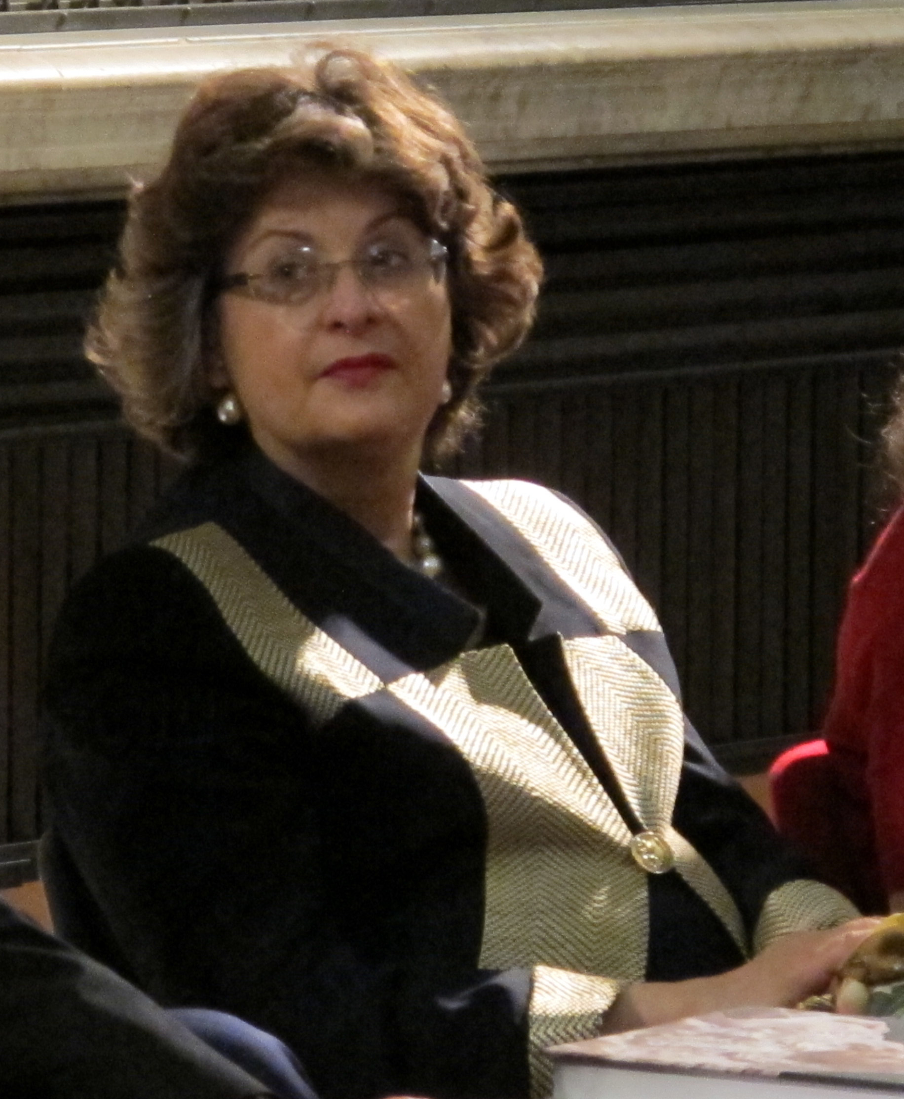 Cristina acidini (giugno 2013)